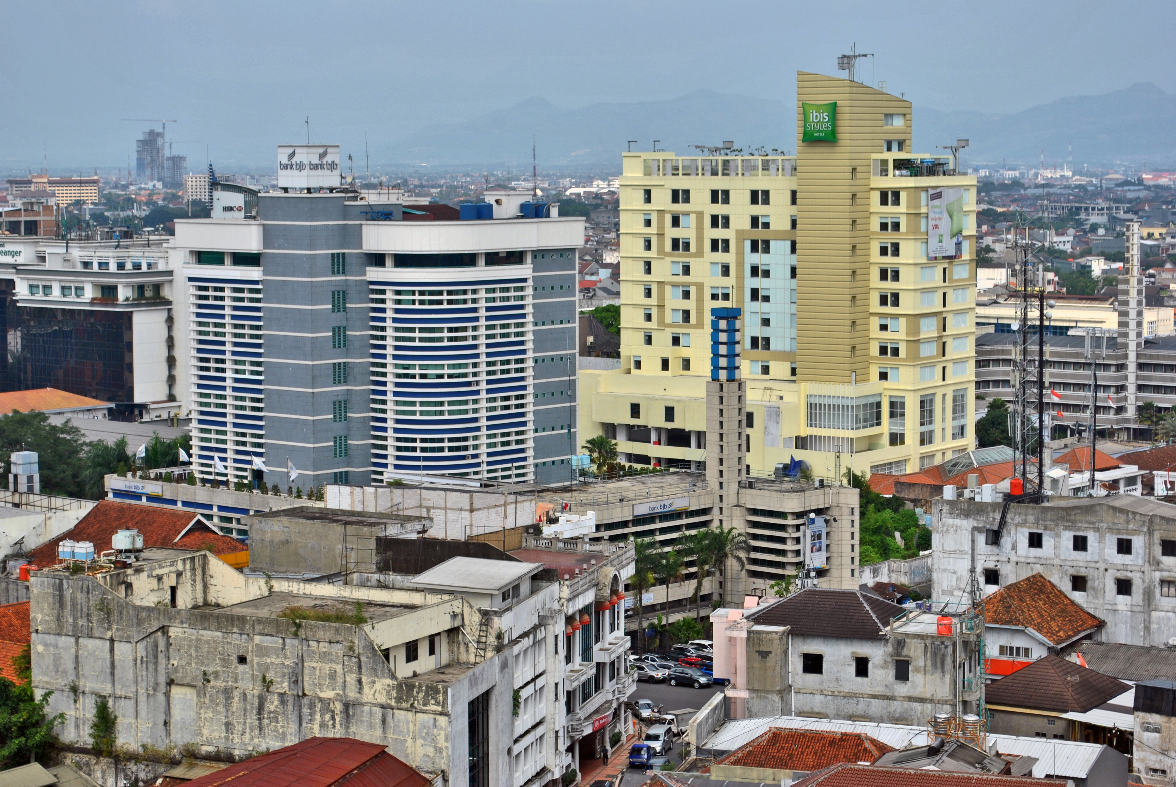 Bank Jabar Banten head office and Ibis Braga, all sandwiching Bandung's architectural gem. Gedung Bank Jabar Banten dan Hotel Ibis Braga, menghimpiti beberapa gedung bersejarah Bandung.